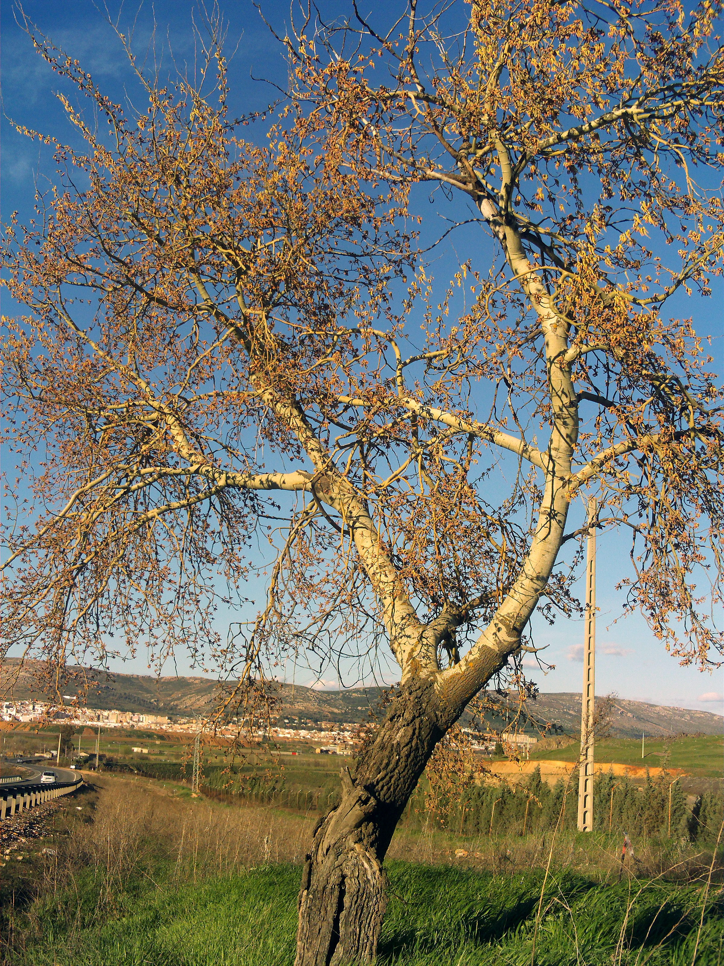 Populus × canescens habitus — Dehesa Boyal de Puertollano botanical garden, in Castile-La Mancha, Spain.